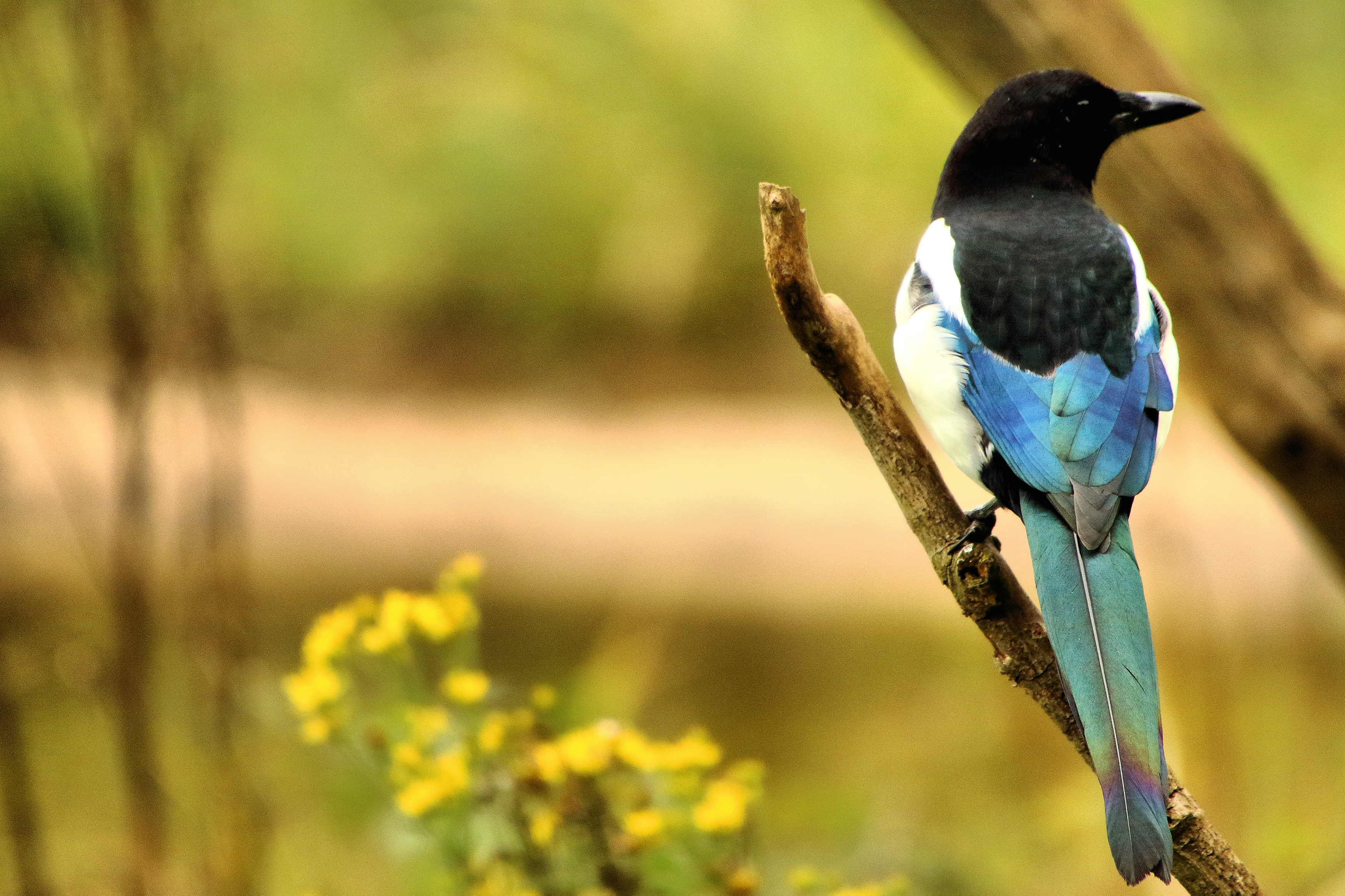 Magpie - RSPB Sandy